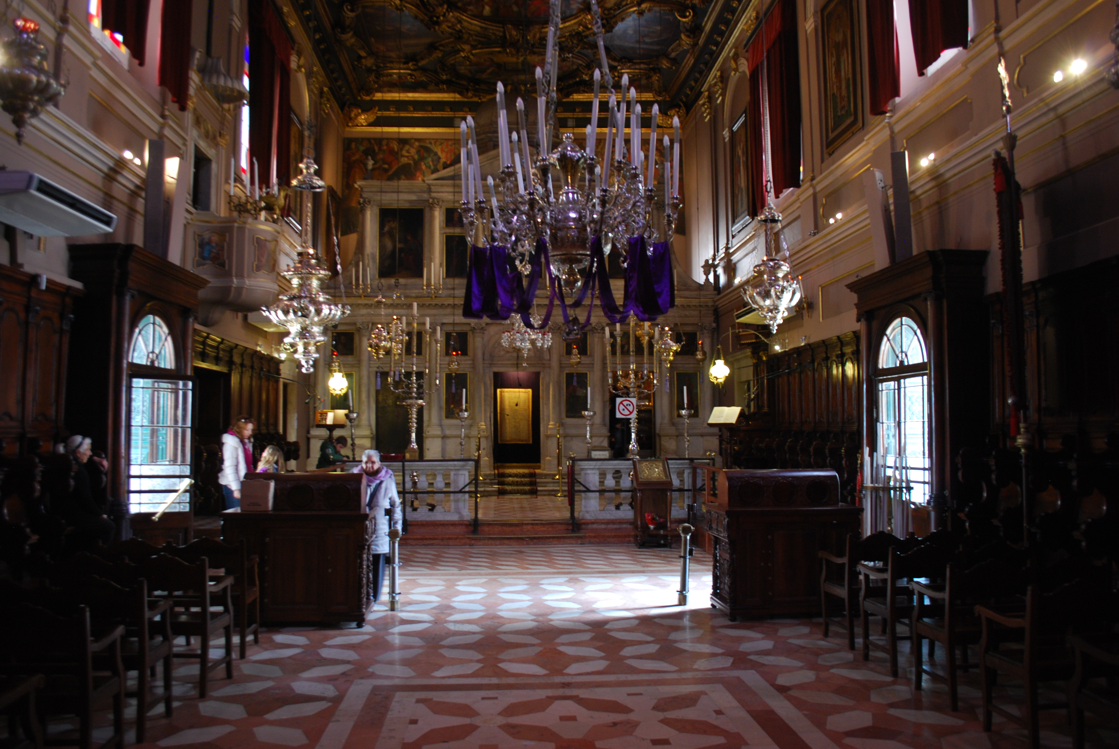 Vue de la vieille ville de Corfou.